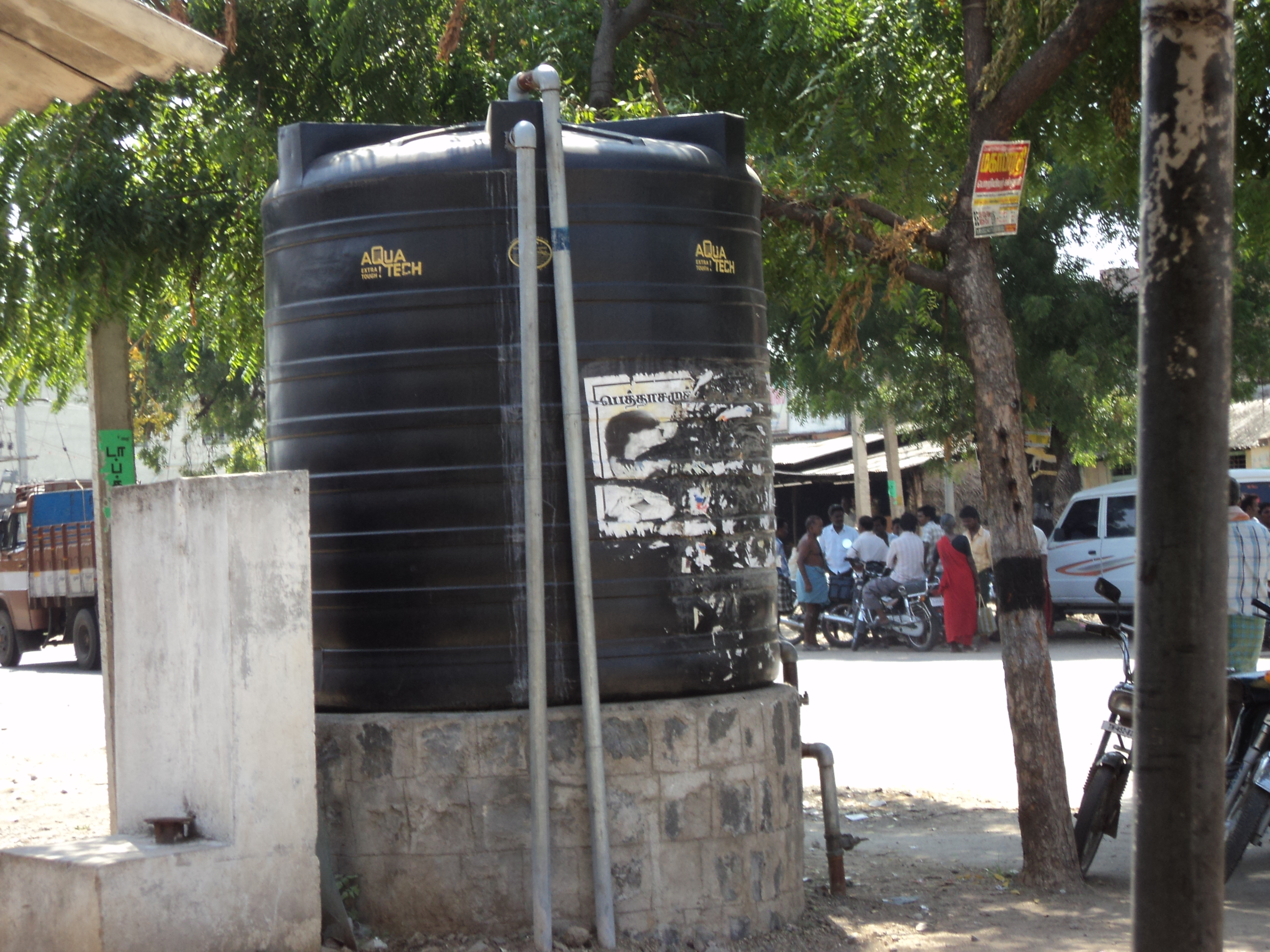 rural areas in Tamil Nadu, India.